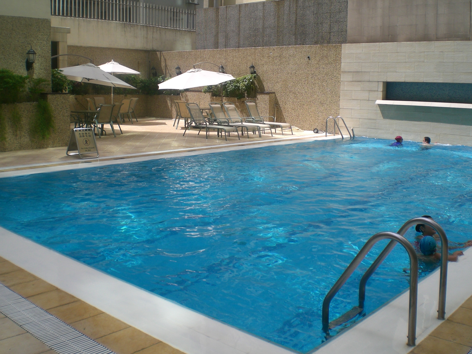 游泳池, 君怡酒店 (澳門)